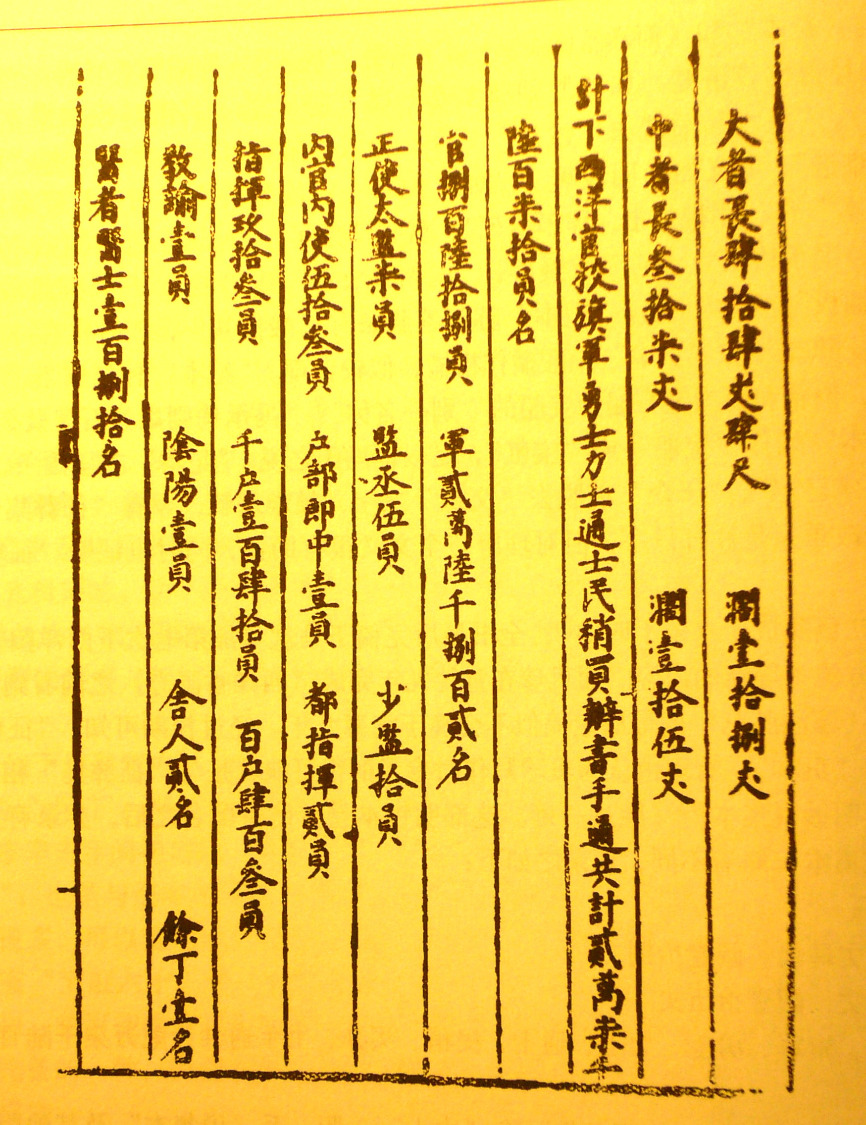 《瀛涯胜览》明抄本《三宝征夷集本》宝船资料